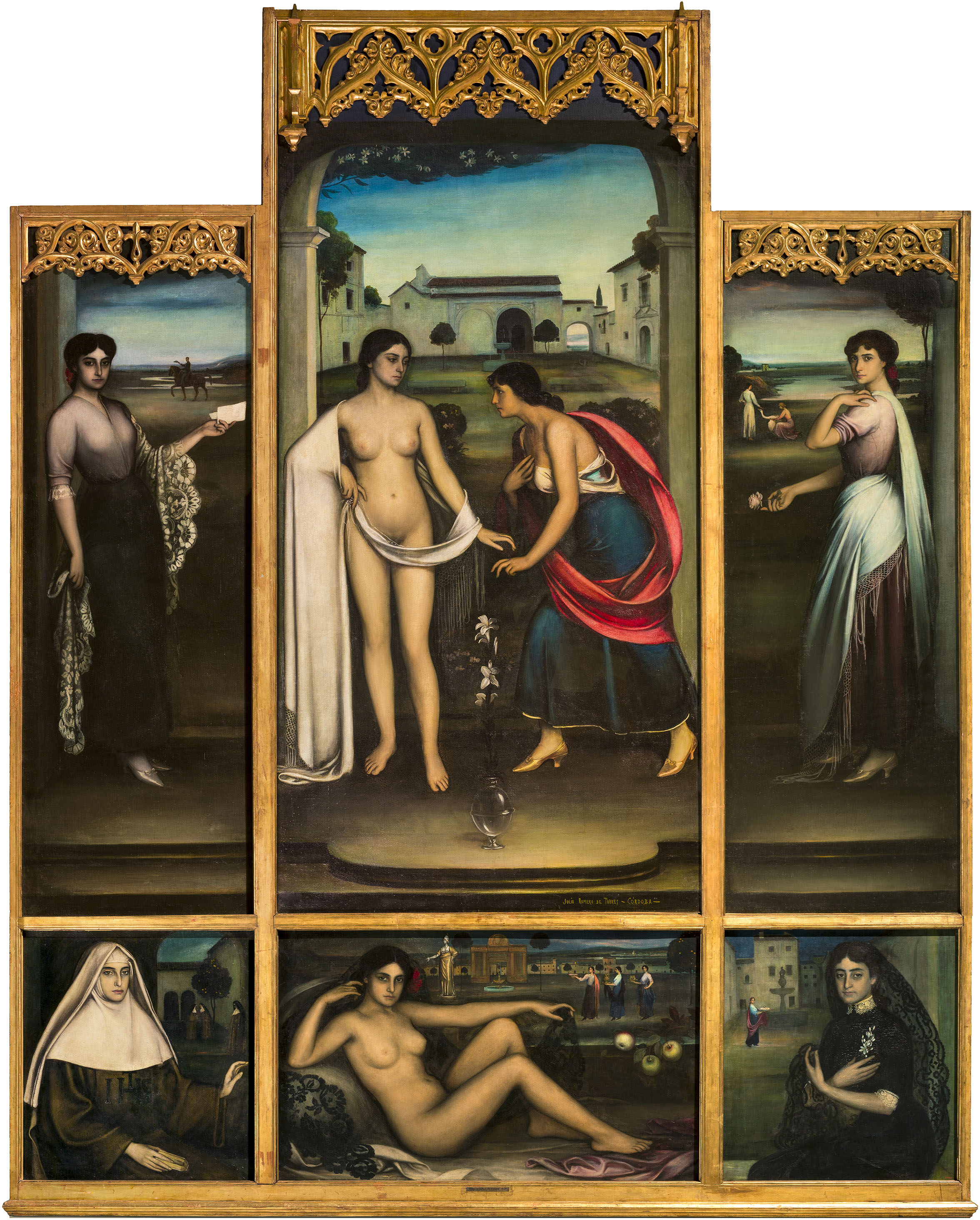 Retablo del amor. 1910. Óleo y temple sobre lienzo. 398 x 284 cm. Museo Nacional de Arte de Cataluña, Barcelona (España).